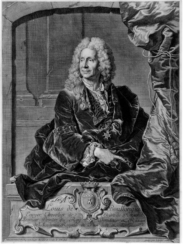 Portrait of Louis de Boullogne (1654-1733), French painter